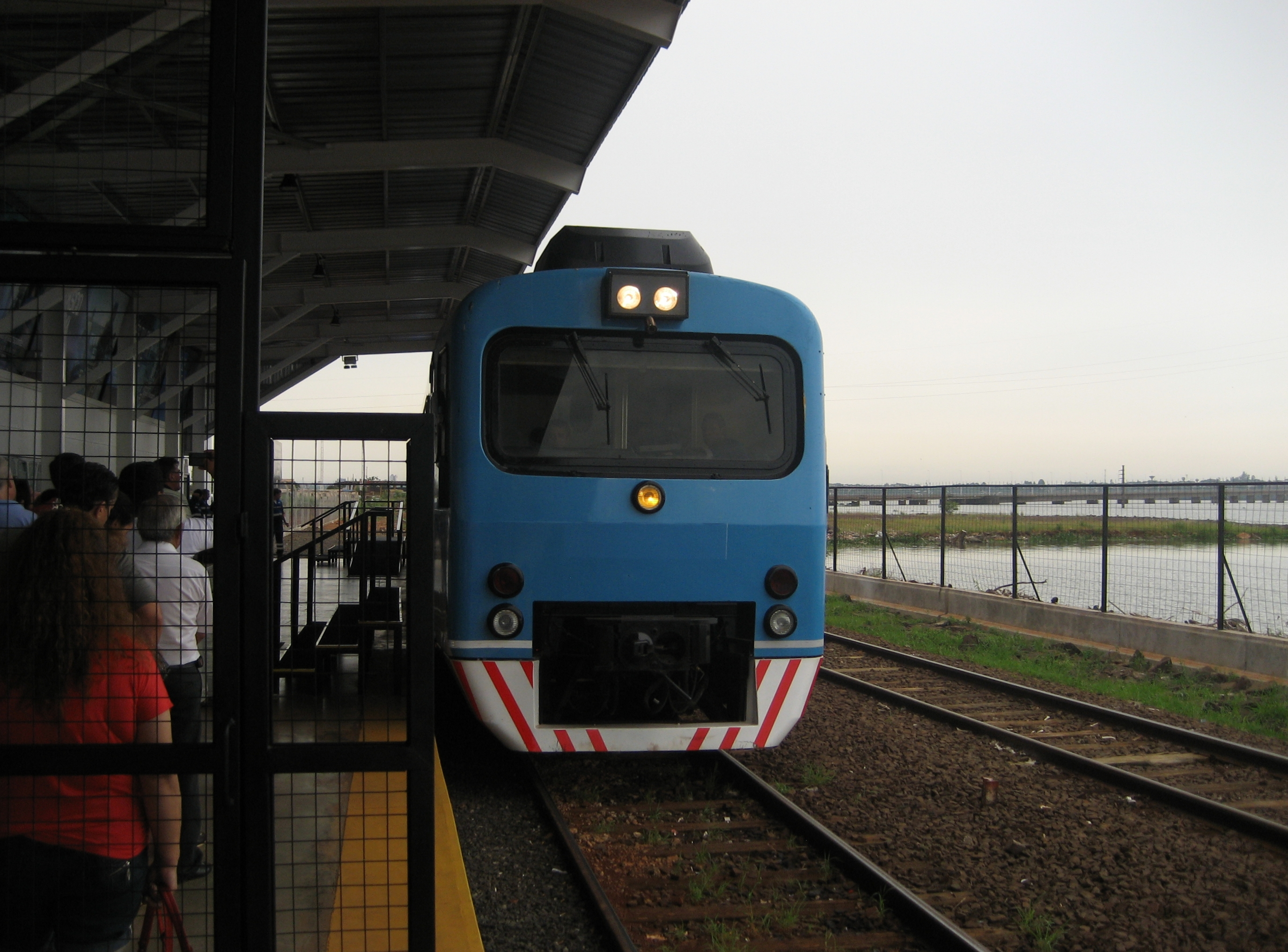 Apeadero Posadas, Misiones, Argentina; se acerca el tren liviano desde Encarnación, Paraguay